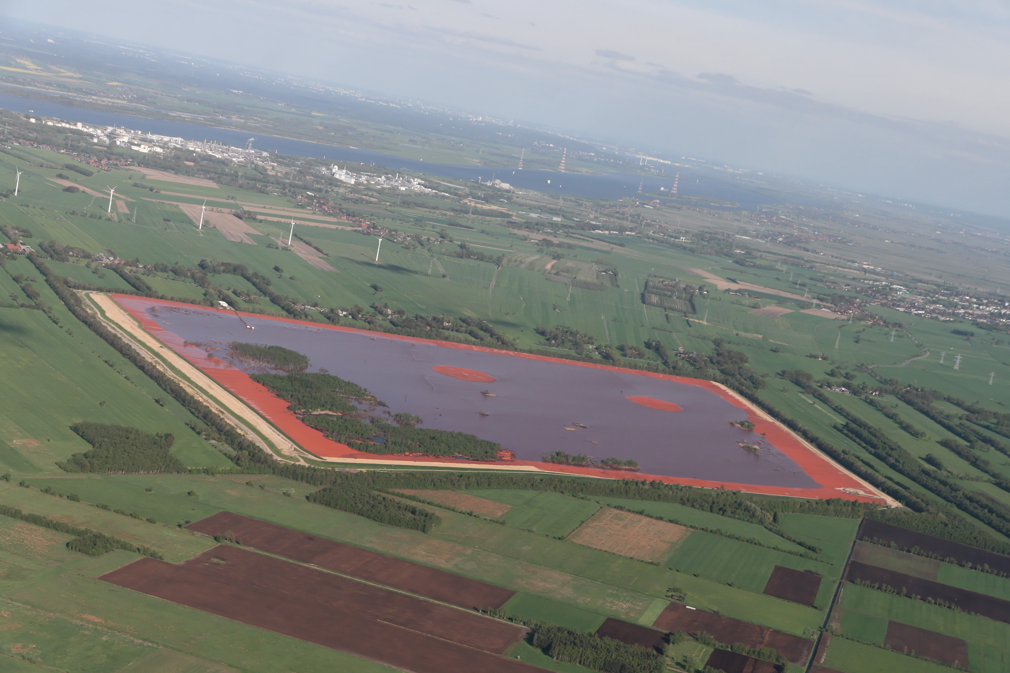 Blick von Westen op de Roodslammdeponie, Bützfletermoor an de Achterkant von de Deponie, ganz in'n Achtergrund de Elv mit Bützfleet, dat Industrierebeed Bützfleet (links) un Stood (rechts).